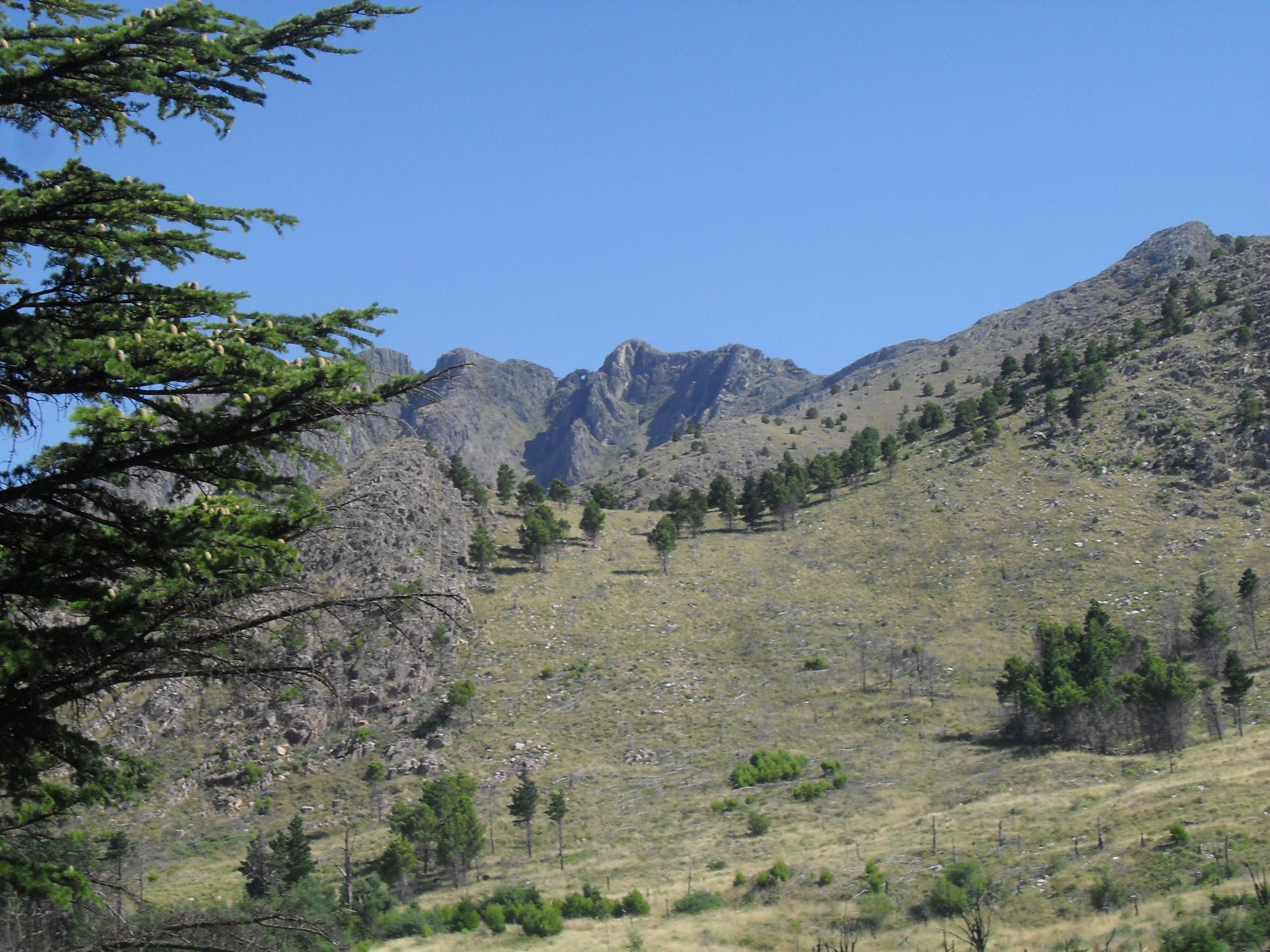 Cerro Ventana desde su base, en la prov. de Buenos aires, Argentina